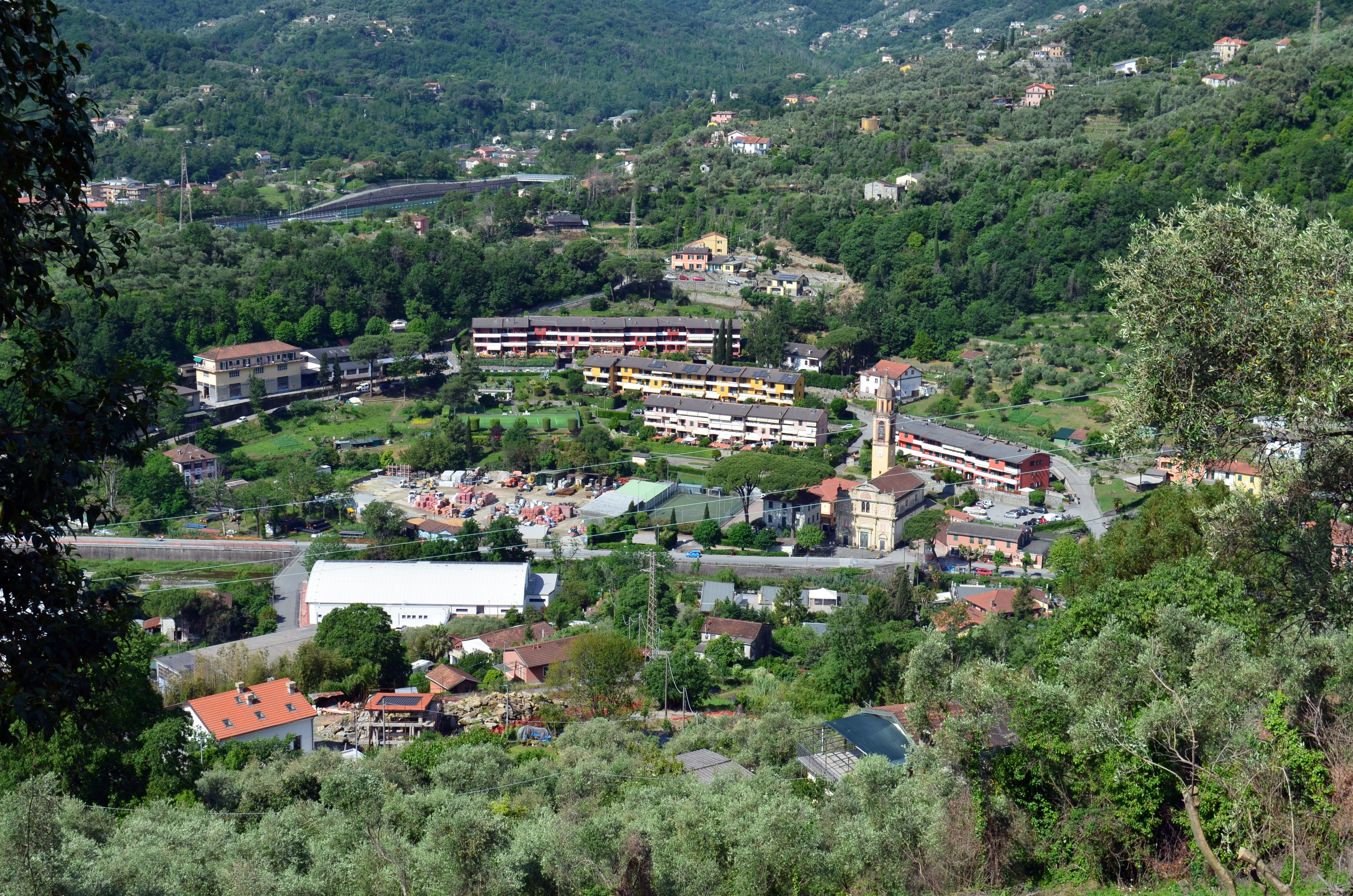 Panorama di San Pietro di Novella, frazione di Rapallo, Liguria, Italia